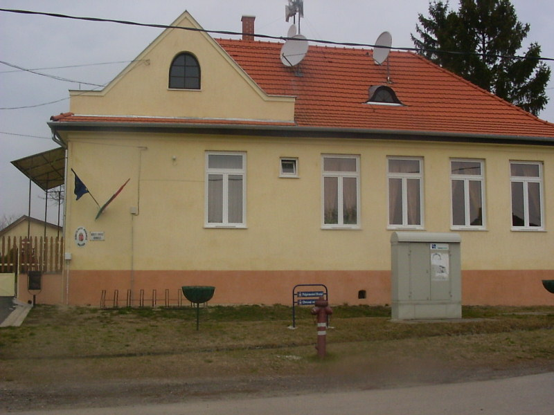 Nagydémi községháza